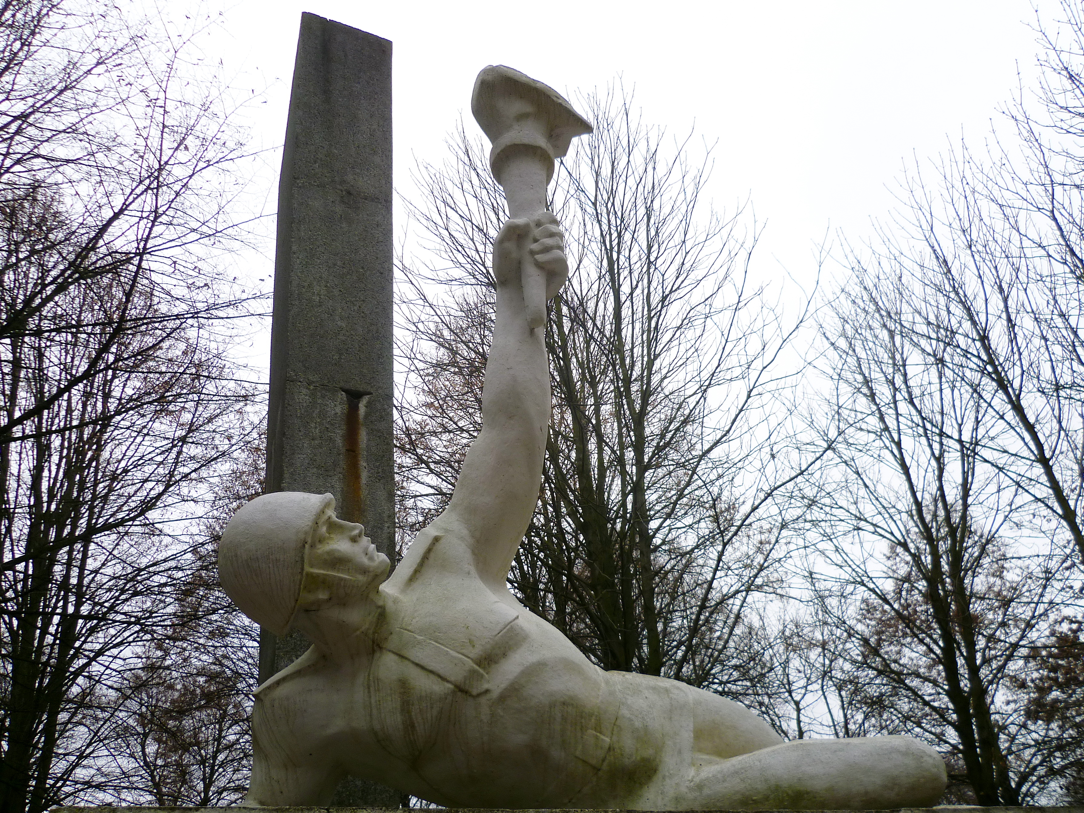 Пам’ятник землякам (1971 рік) – фігура солдата – с.Грибовиця Іваничівський район Волинська область Україна